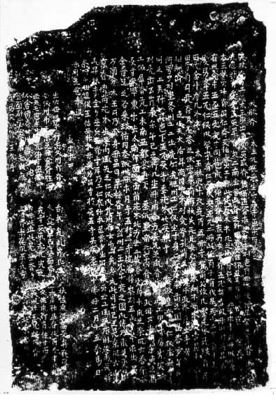 契丹大字-北大王墓志。契丹大字的重要研究文献。